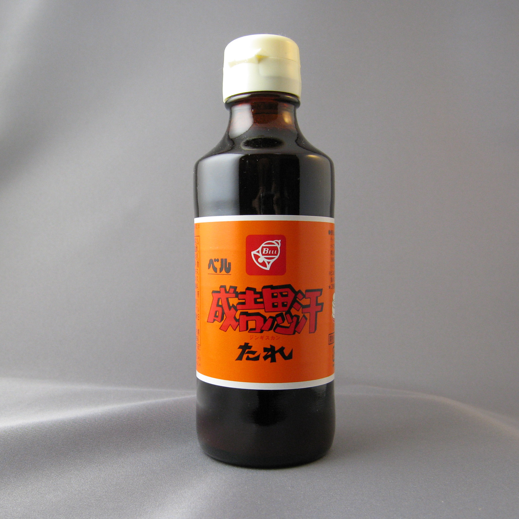 Mongolian barbecue sauce "GenghisKhan-no-tare" , Bell Shokuhin Hokkaido, Japan